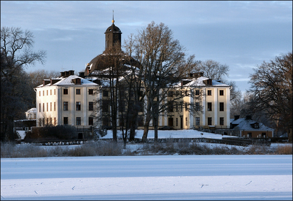 Örbyhus slott från Vendelsjön